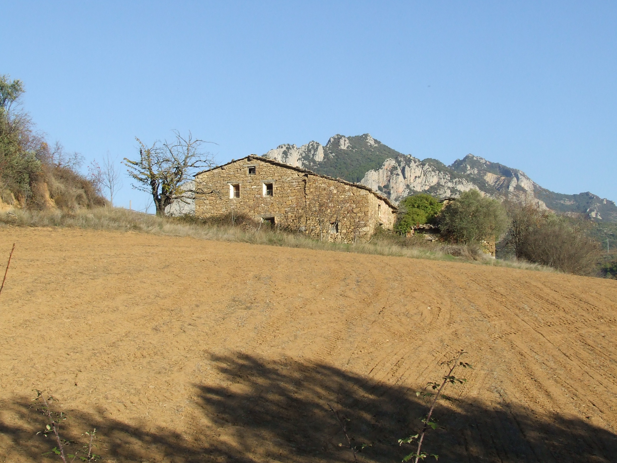 Casa Montsor de Ço del Jou (Abella de la Conca, Pallars Jussà)